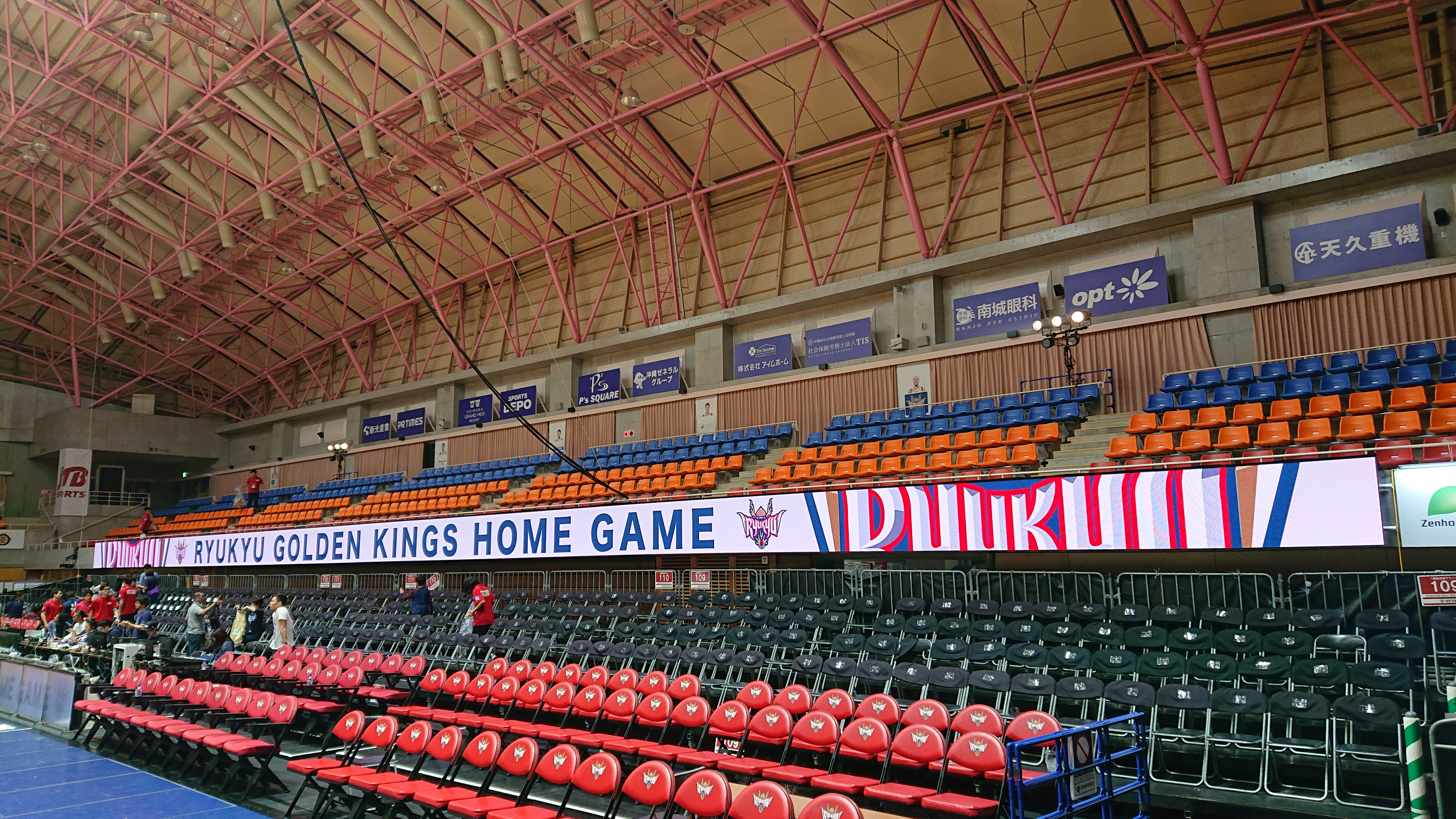 琉球ゴールデンキングス ホームゲーム アドボード